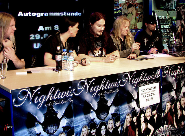 Nightwish em sessão de autógrafos em Hamburgo.